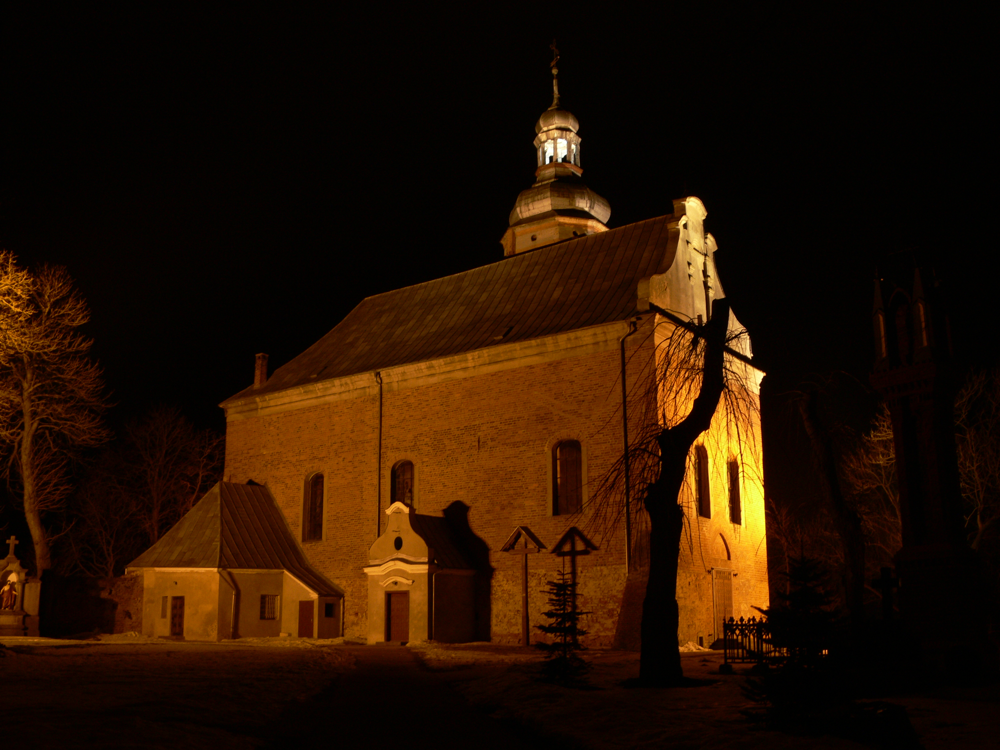 Krajenka - Kościół św.Anny nocą Autor - Bartek Wawraszko